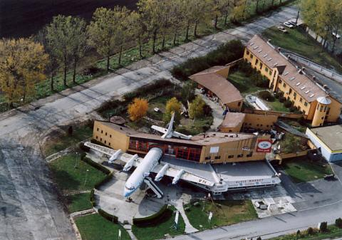 Abda, Hungary, aerialphotgraphy